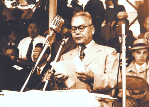 1945.11 신익희 귀국 환영사 낭독 장면, 서울 동대문운동장